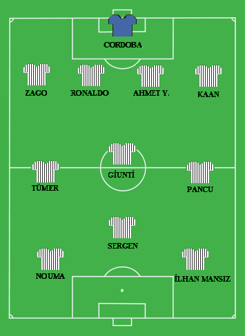 bu kadro yanlış Oscar Cordoba1 Ali Eren44 ( Tolga Doğantez2 ) - Carlos Antonio Zago30 - Guirio Ronaldo5 Kaan Dobra17 - Federico Quinti20 ( Yasin Sülün6 ) - Tayfur Havutçu3 - İbrahim Üzülmez19 Daniel Gabriel Pancu9 - Sergen Yalçın10 ( Tümer Metin67 ) İlhan Mansız26 ( Pascal Nouma21 ) Not: 100.yılda ara transfer döneminde Federico Qiunti İtalya'dan Beşiktaş'a transfer edilmiş, o zamanki turkcell 1. lige transfer olan ilk oyuncu olmuştur. Zago ve Ronaldo'nun yanında defansın göbeğinde Ali Eren ve Tolga Doğantez dönüşümlü oynamıştır. Ahmet Yıldırım 101. yılda transfer edilmiştir. Tümer Metin Sergen Yalçın'ın genelde yedeği olmuştur ve genelde ikisi bir arada oynamamıştır. Ayrıca 100. yıl kadrosunda İbrahim Üzülmez nasıl olmaz?